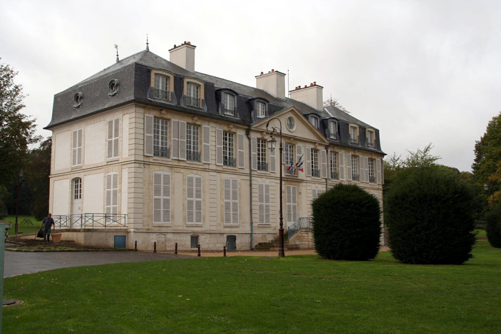 Château (hôtel de ville) de Flins-sur-Seine - Yvelines (France)